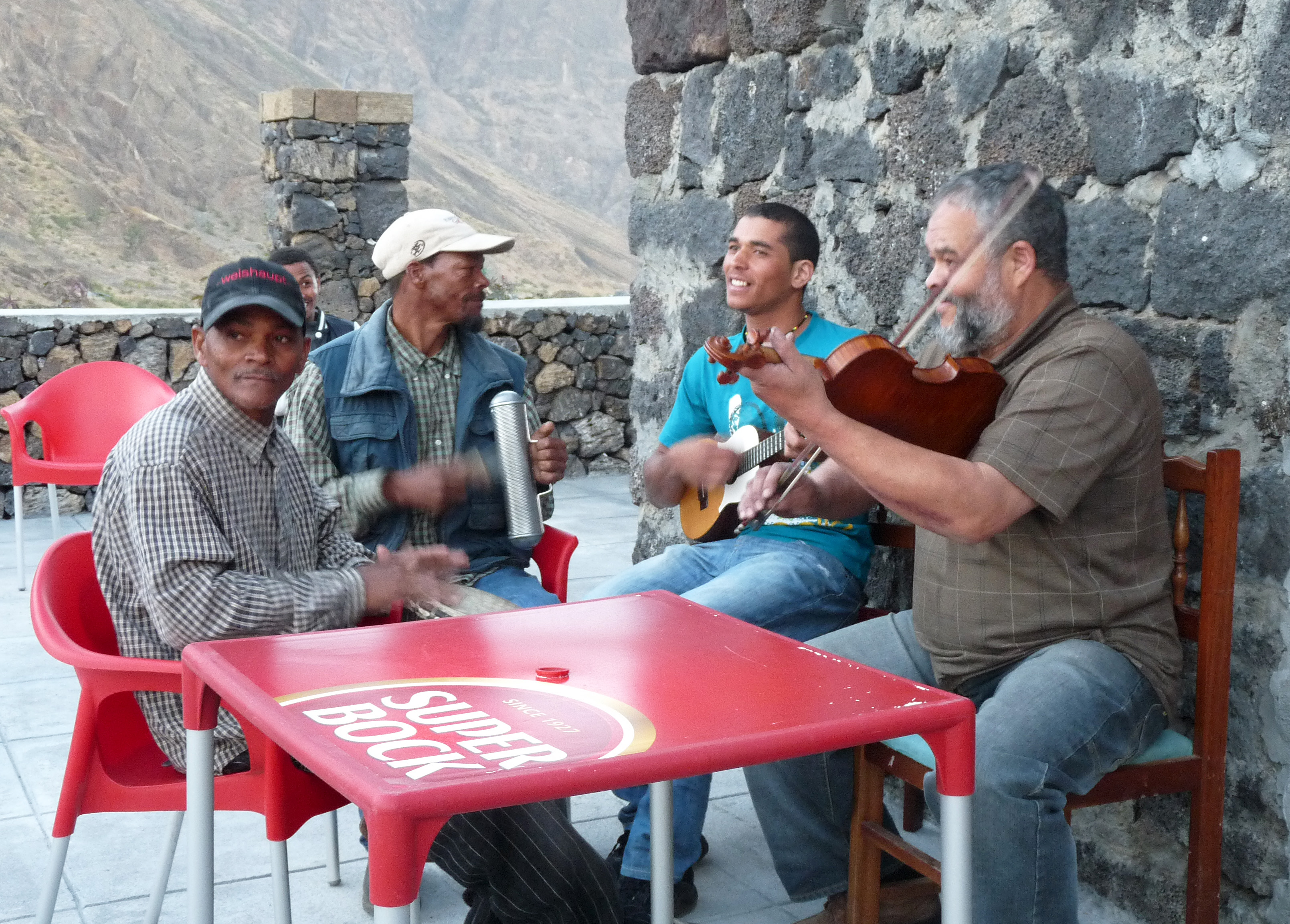 Chã das Caldeiras (île de Fogo, Cap-Vert) : musiciens (djembe, ferrinho, cavaquinho, violon)